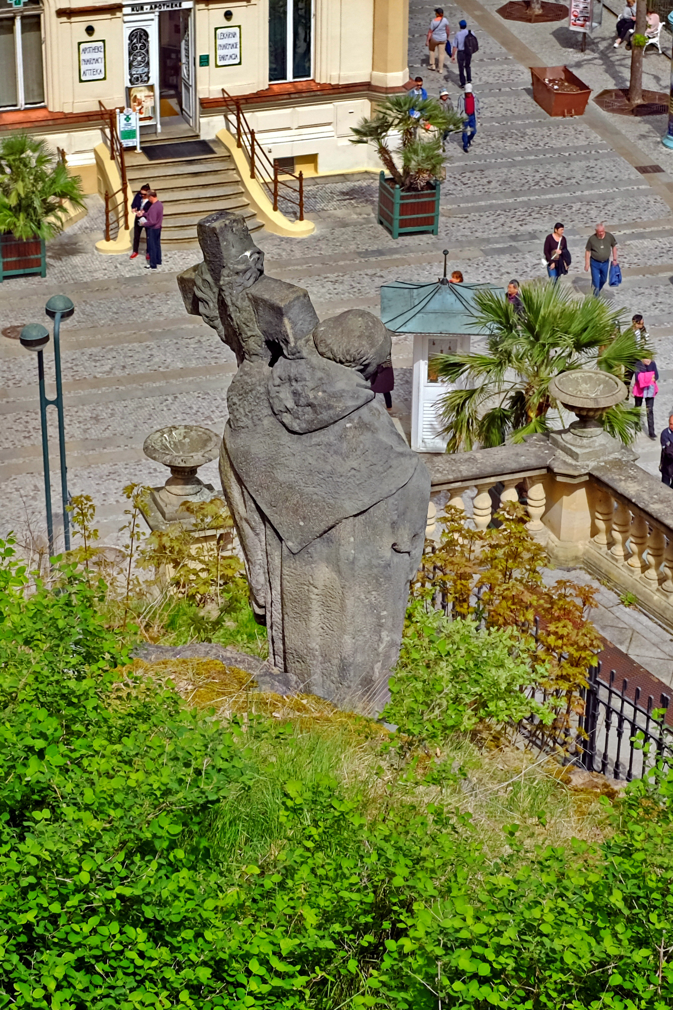 Socha svatého Bernarda z Clairvaux, Mlýnské nábřeží, severně od Mlýnské kolonády, u schodů do Skalníkových sadů, parc. 1233/1, Karlovy Vary.